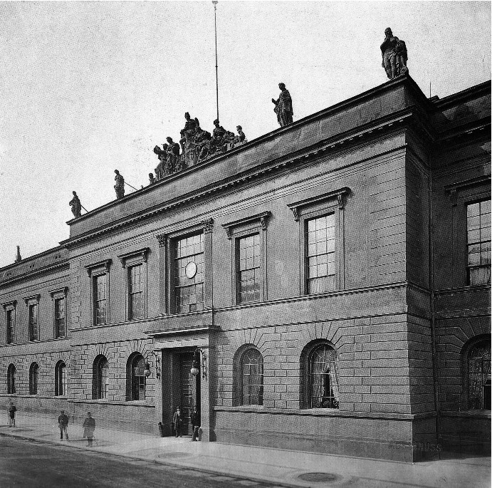 Akademie der Wissenschaft mit Normalzeituhr